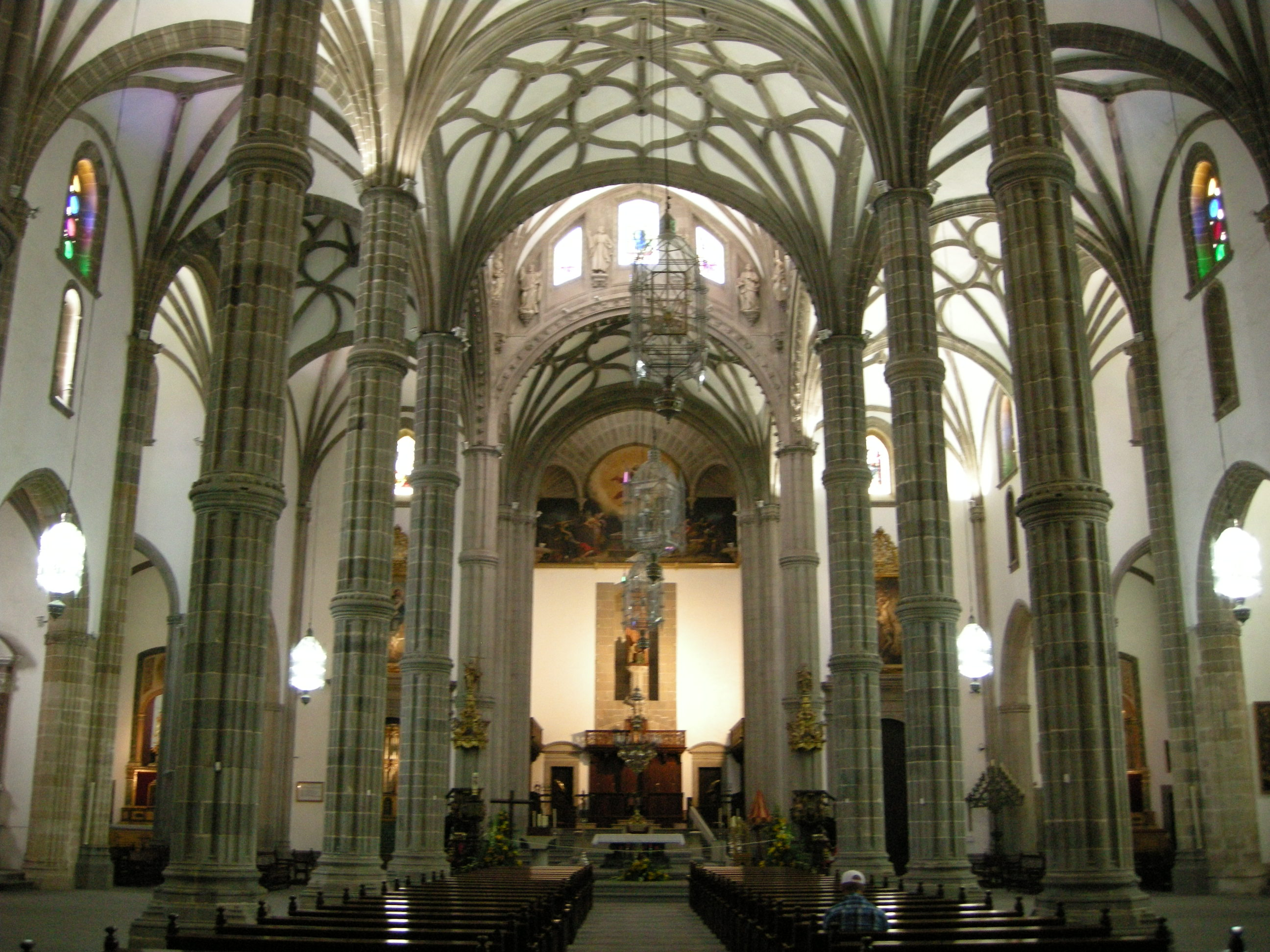 Catedral de santa ana, interno